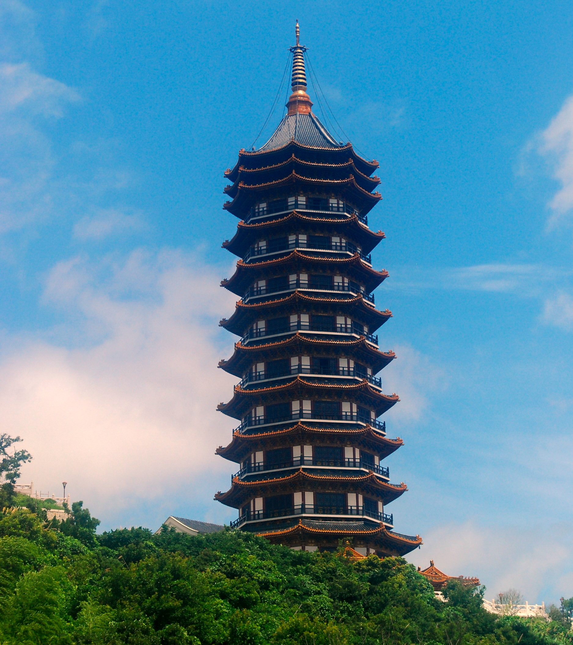 中文（中国大陆）: 普陀山惠济寺塔